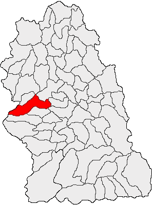 Categorie:Hărţi ale judeţului Hunedoara